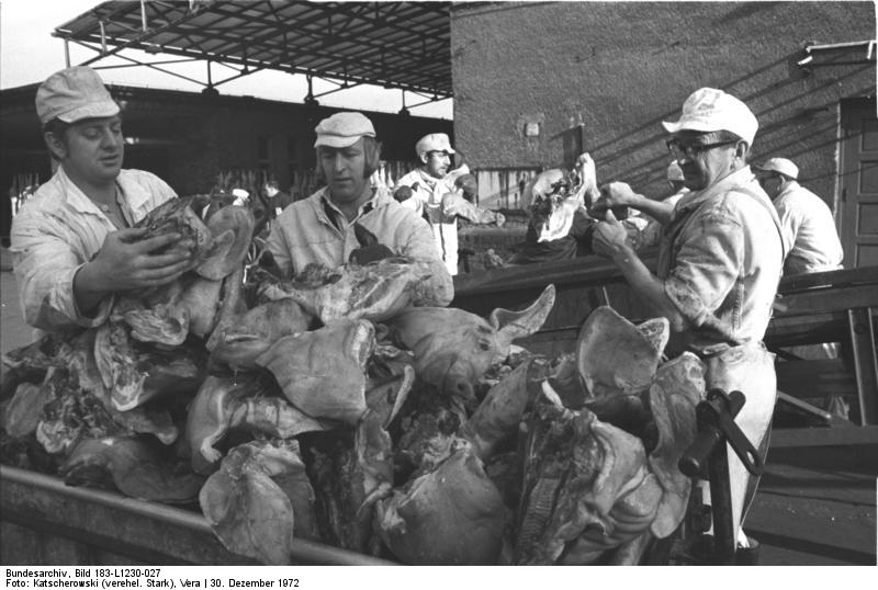 Berlin, Fleischkombinat ADN-ZB/Katschorowski/30.12.72/Berlin: Plansilvester im Fleischkombinat Nicht als Fleischbeilage für eine Silvesterfeier, sondern für den Export sind diese Schweineköpfe bestimmt, die Werner Damrow, Norbert Paul, Jobst Strohfeld und Willi Lehmann von der Brigade "7. FDGB-Kongreß" hier im Fleischkombinat Berlin verladen. Fleisch- und Wurstwaren - speziell vakuumverpackte Ware - liefert das Fleischkombinat an die Hauptstadt und die Randgebiete. Am 1.Januar 1973 begeht das Fleischkombinat Berlin seinen 10.Jahrestag. Vorbildliche Planerfüllung und zusätzliche Produktion sind die Festtagsgeschenke der Werktätigen.